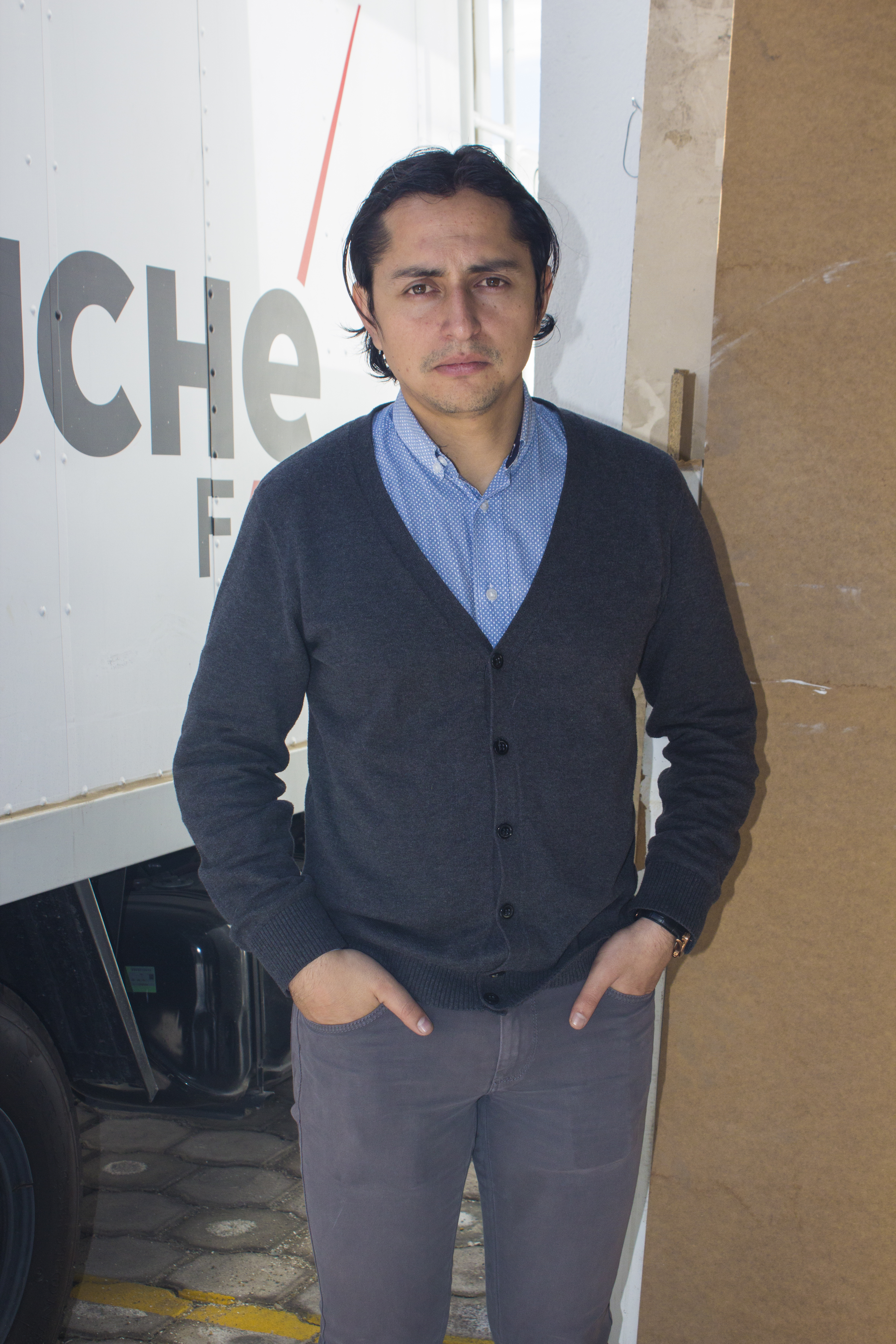 Orlando Herrera, actor y director de Enchufe.tv parte de la productora TouchéFilms.